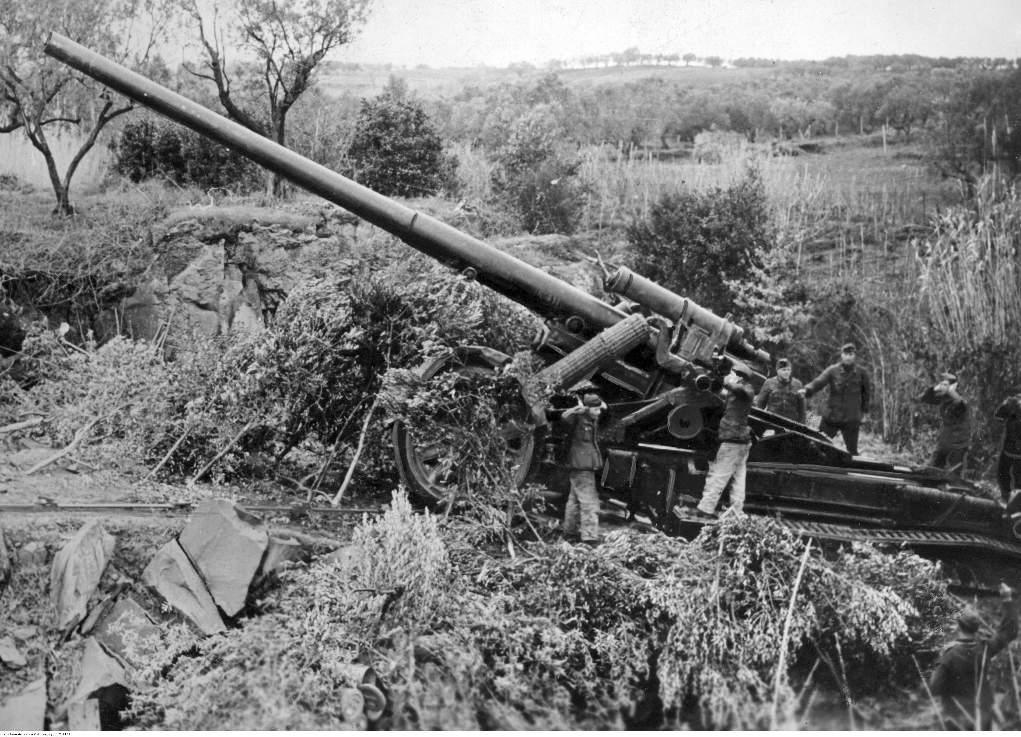 Ciężka armata niemiecka - K 18 kal. 170 mm Morserlafette wraz z obsługą na stanowisku na froncie pod Nettuno - Anzio.